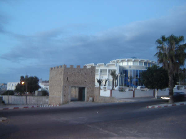 Saint benzmirou.